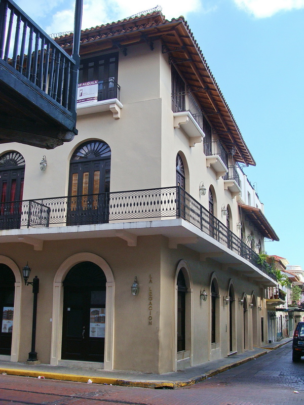 Edificio la legación en Casco antiguo de Panamá